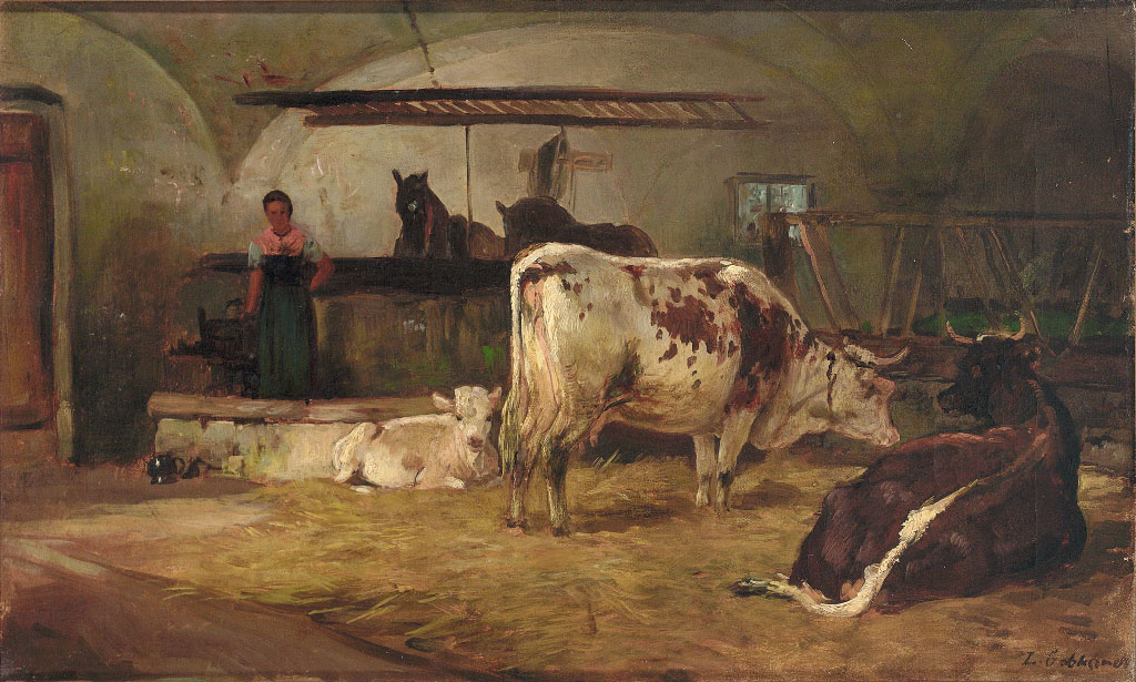 Ludwig (Louis) Gebhardt (1830–1908): Blick in einen Stall mit Bäuerin, Kühen, Kalb und Pferden. Öl/Lwd. 30 x 50,5 cm